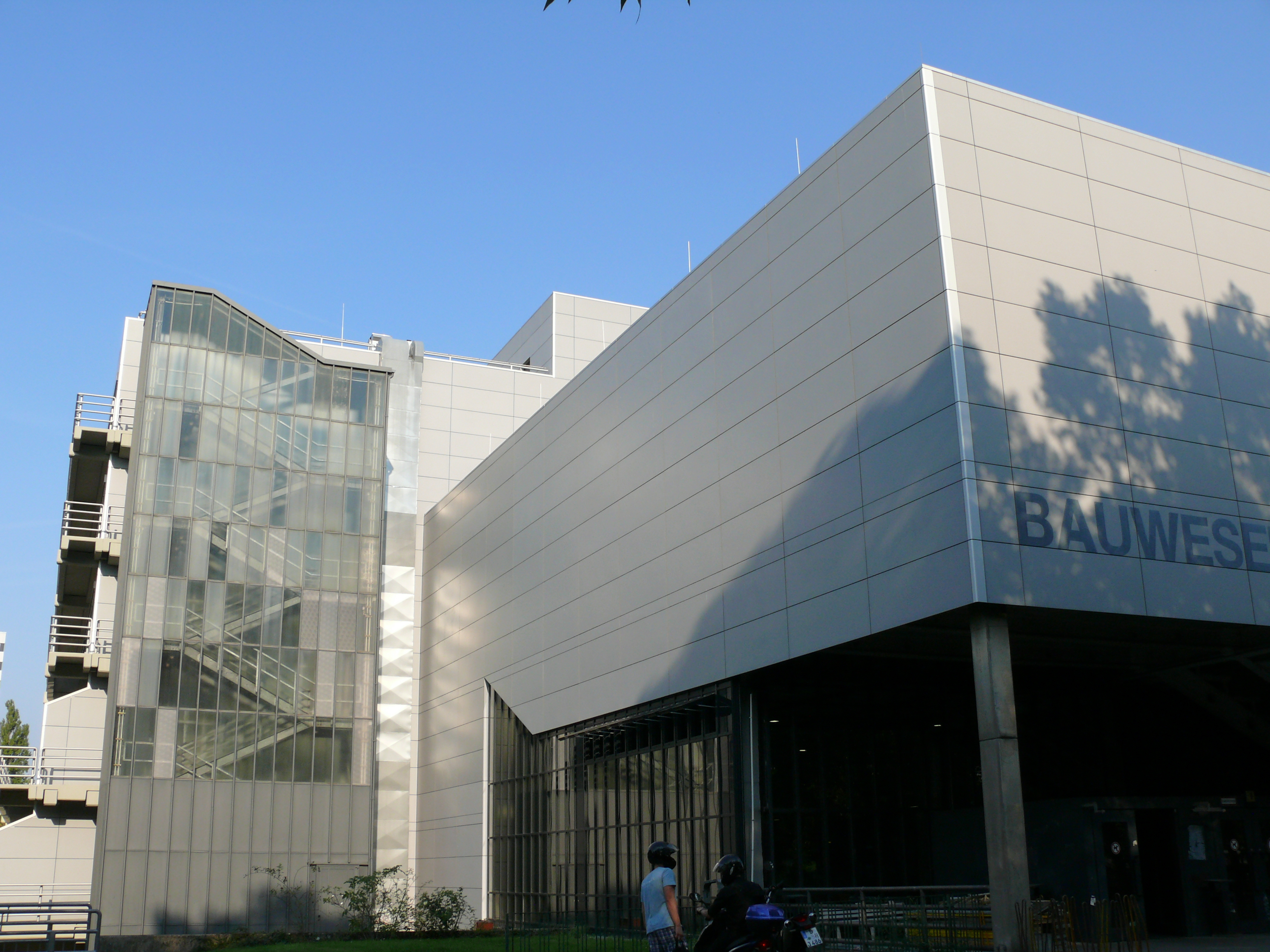 Berlin-Wedding Beuth Hochschule Haus Bauwesen